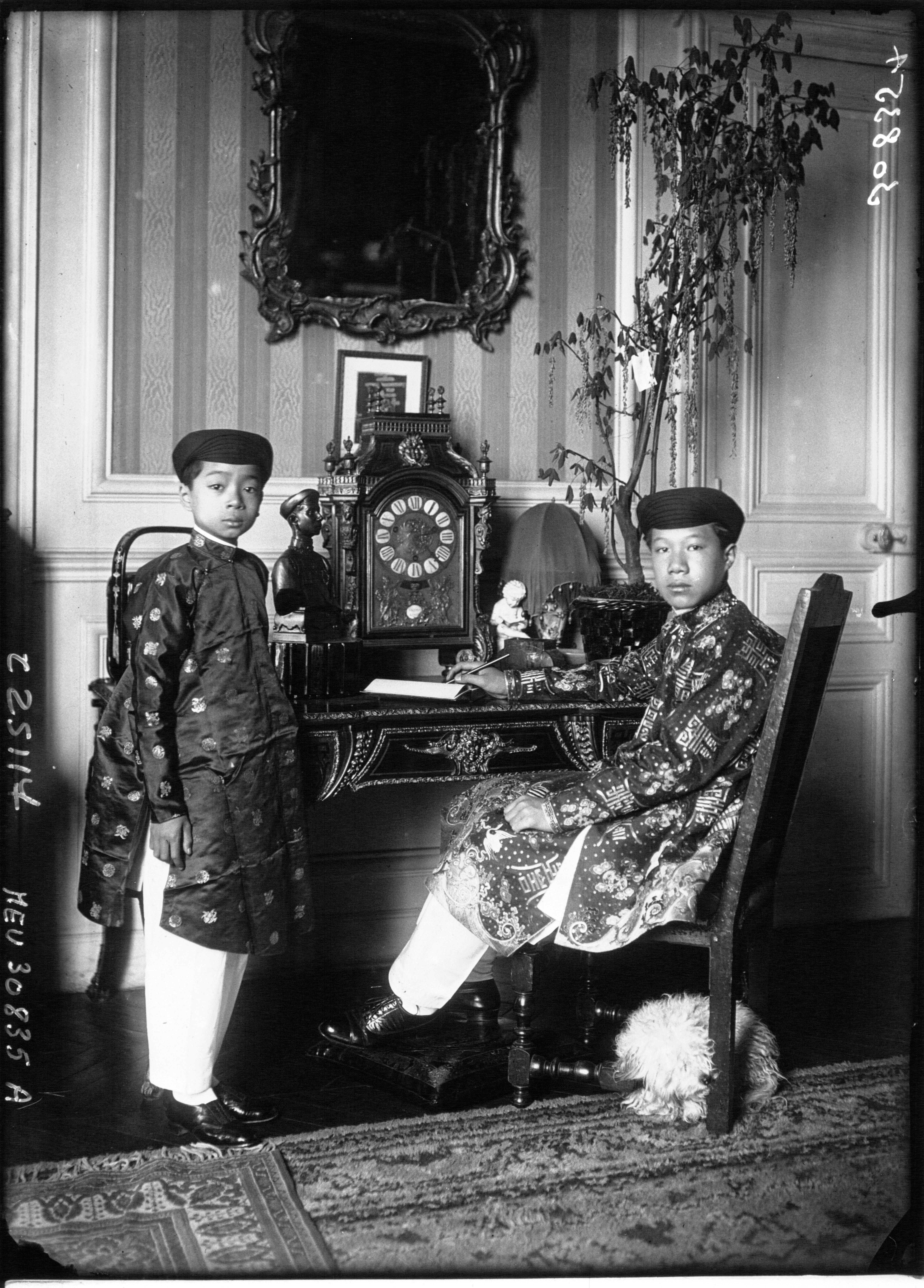 Le jeune Empereur d'Annam Bao Daï avec son jeune Cousin le jeune Prince Vinh Can : [photographie de presse] / Agence Meurisse